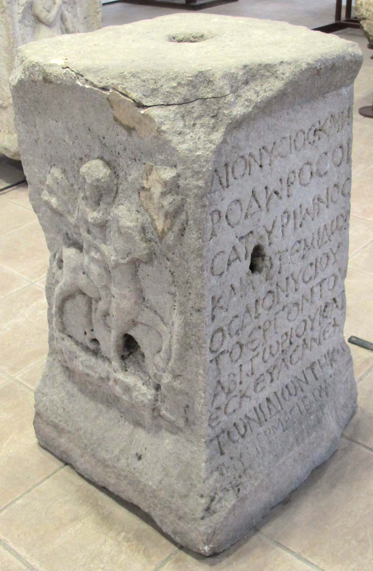 Histria, altare votivo, II sec